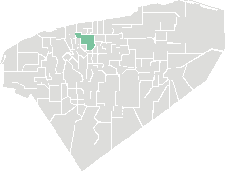 locatie van de gemeente Motul in Yucatán